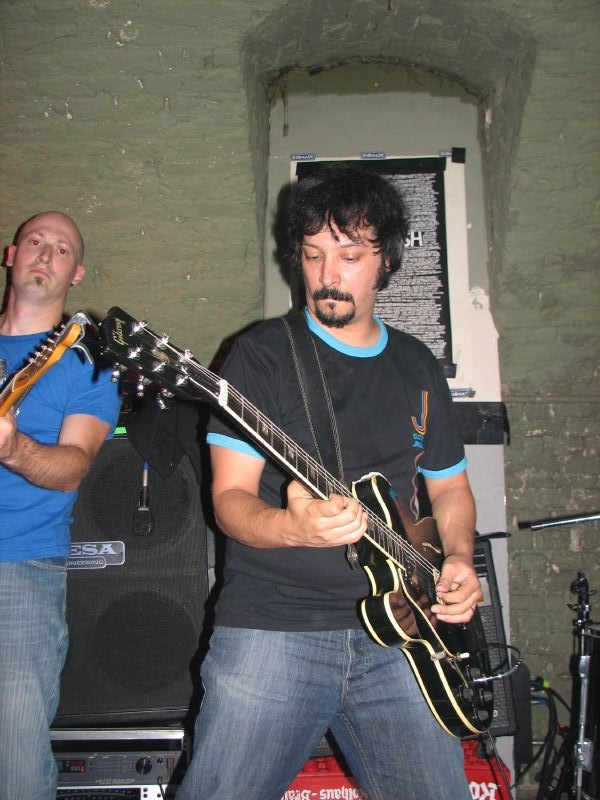 Oscar Granieri, guitarrista y cantante de los Súper Ratones.